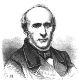 Mathieu de la Drôme